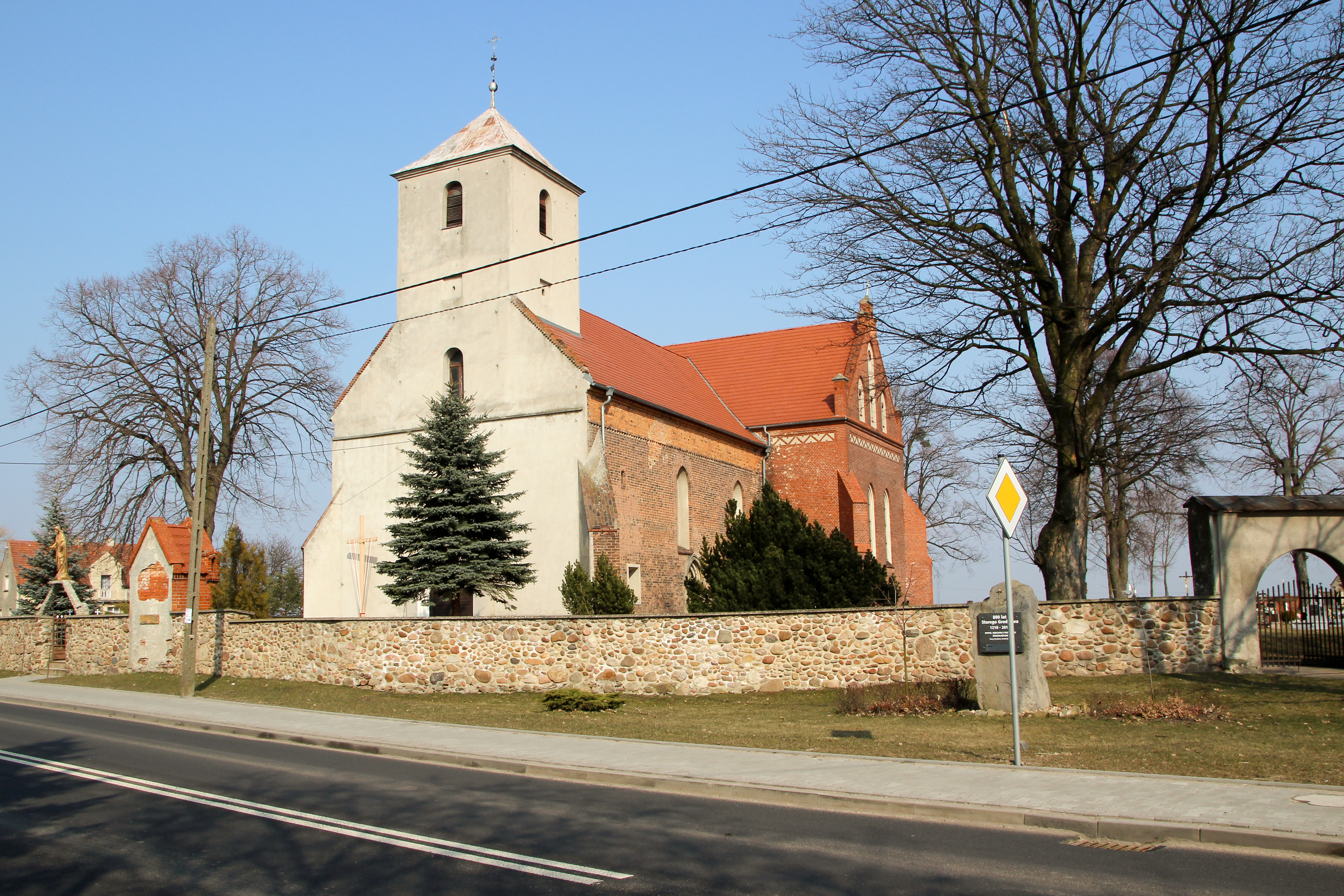 Stary Grodków – rzymskokatolicki kościół parafialny p.w. Św. Trójcy, XIII, 1910